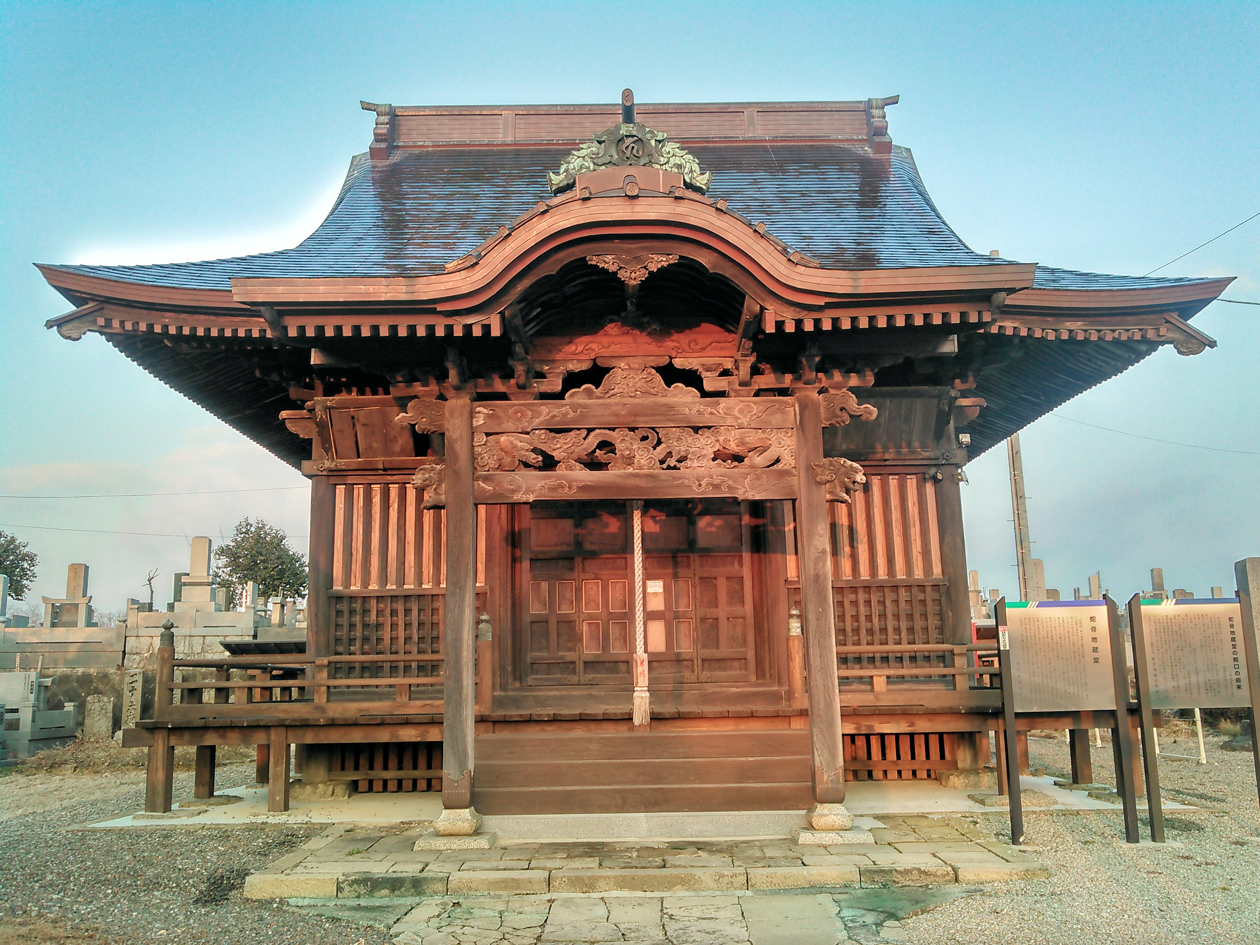 郡山市日和田町の蛇骨地蔵堂